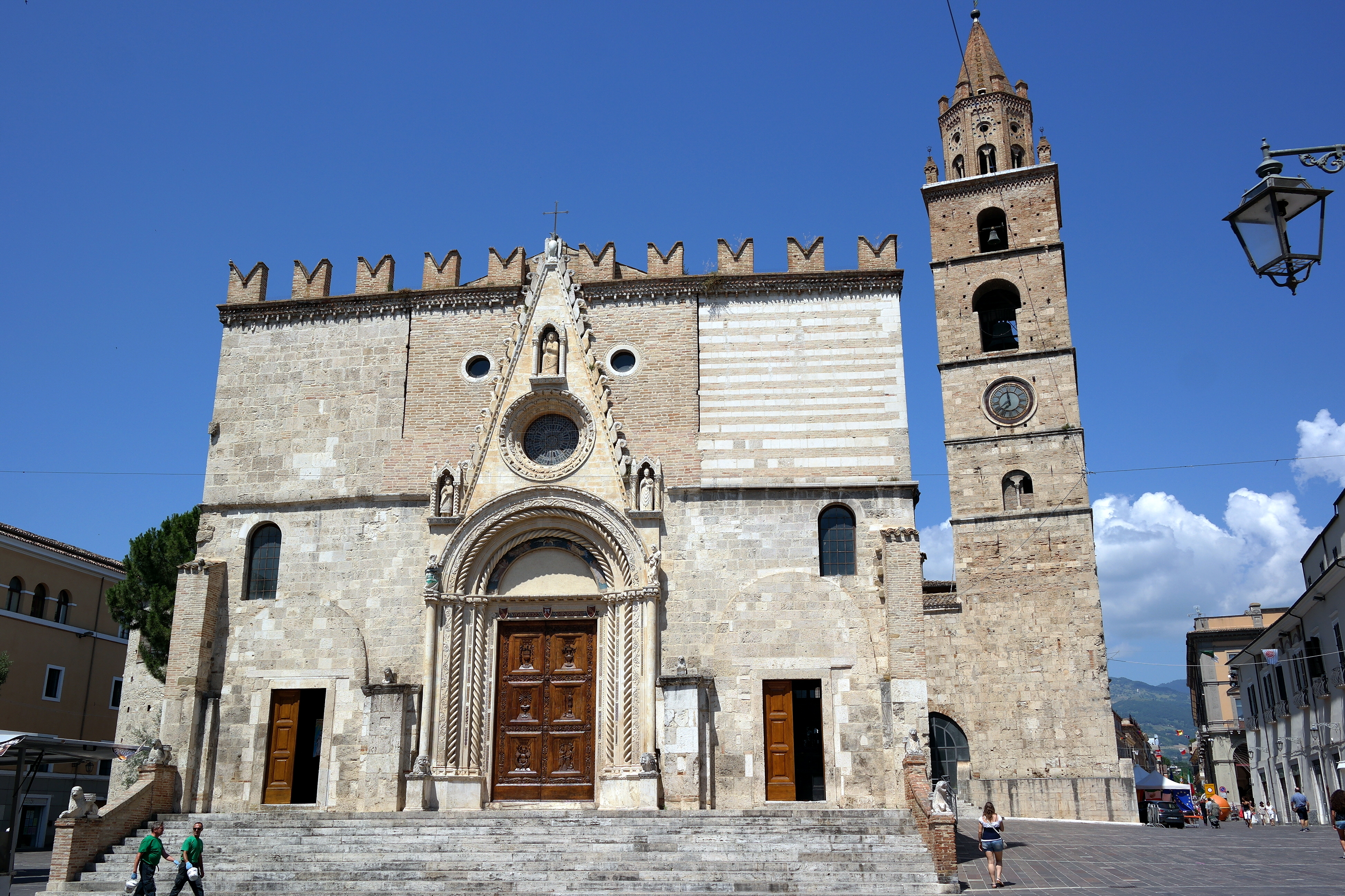 Esterno del Duomo di Teramo